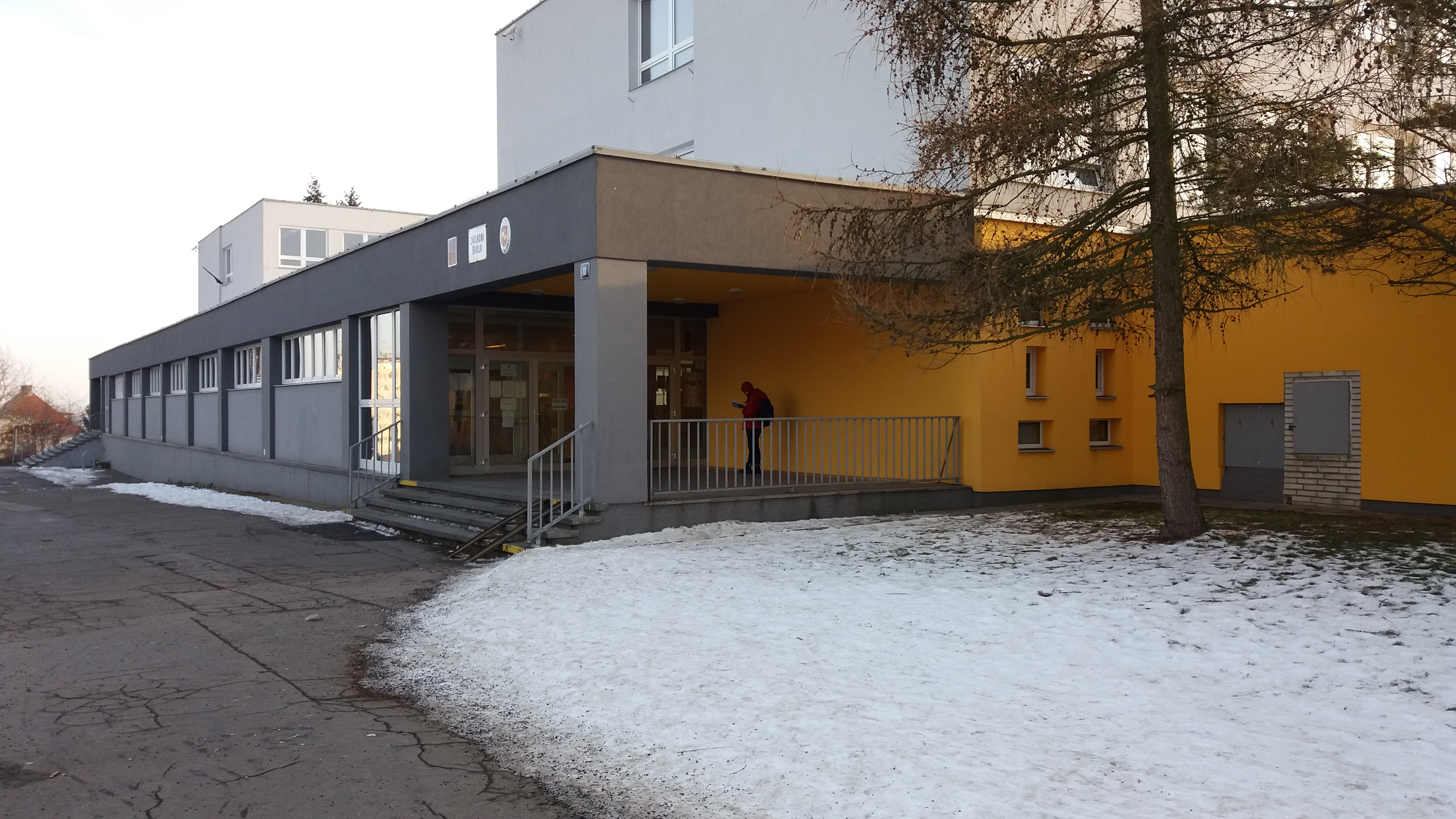 Vstup do základní školy Hovorčovická ve stejnojmenné pražské ulici.